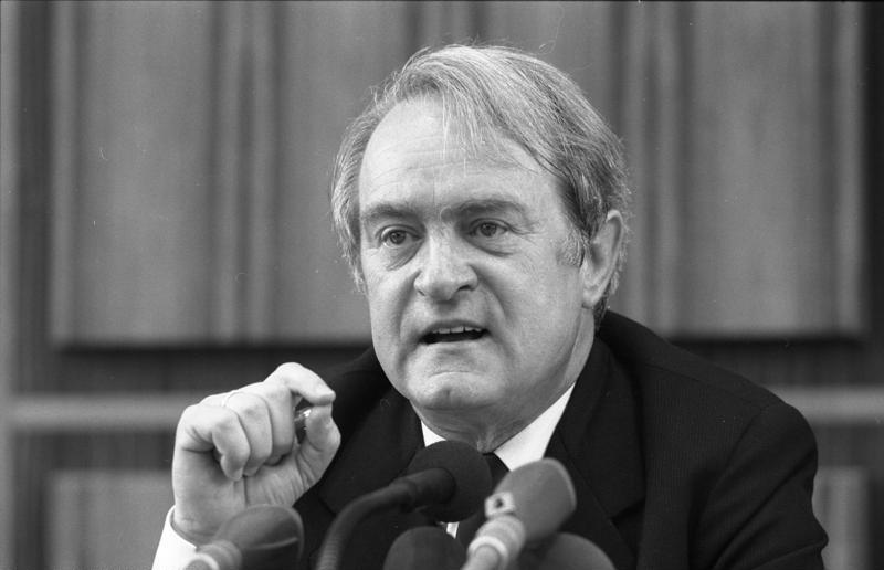 23.9.1986 Pressekonferenz des NRW-Ministerpräsidenten der SPD, Johannes Rau, zu seinem Regierungsprogramm im Falle eines Wahlsieges der SPD bei der Bundestagswahl im Januar 1987- Im Saal der Bundespressekonferenz.